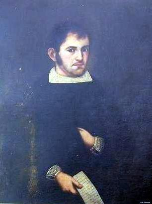 Excmo. Sr. D. JOSÉ VILLANUEVA DE ARÉVALO Y, Que FUE Ministro del Consejo de Castilla y del Tribunal Supremo de España e Indias.